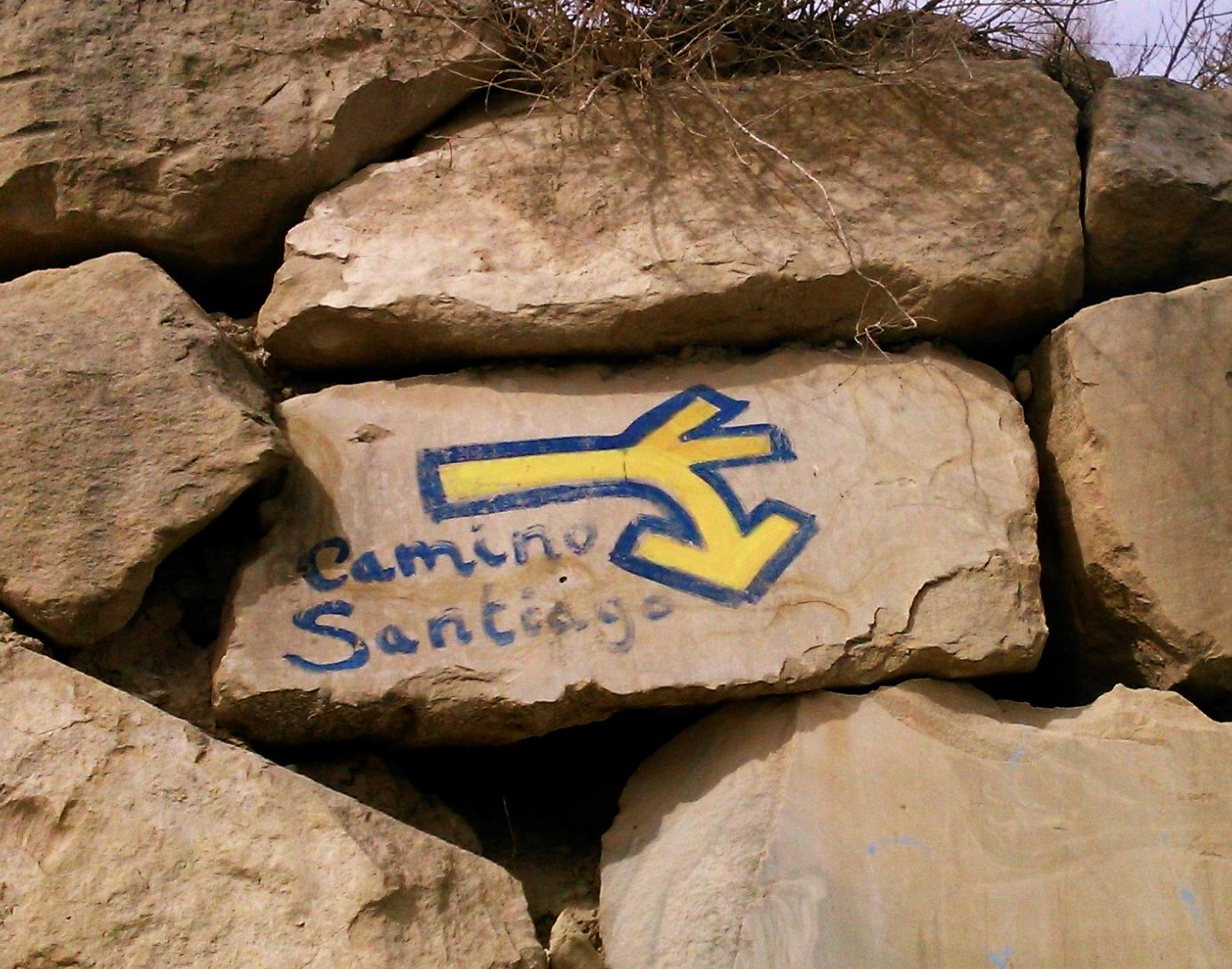 Flecha del Camino de Santiago del Sureste, en Elda